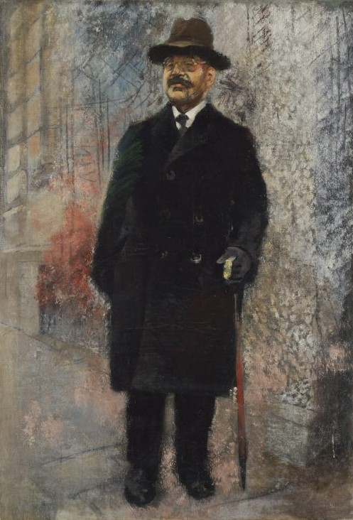 Friedl Dicker-Brandeis - Portrét stojícího muže v černém kabátě a klobouku